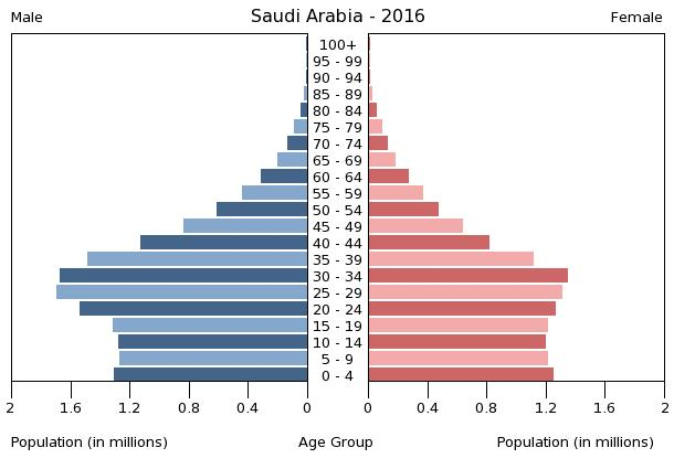 A population pyramid illustrates the age and sex structure of a country's population and may provide insights about political and social stability, as well as economic development. The population is distributed along the horizontal axis, with males shown on the left and females on the right. The male and female populations are broken down into 5-year age groups represented as horizontal bars along the vertical axis, with the youngest age groups at the bottom and the oldest at the top. The shape of the population pyramid gradually evolves over time based on fertility, mortality, and international migration trends.